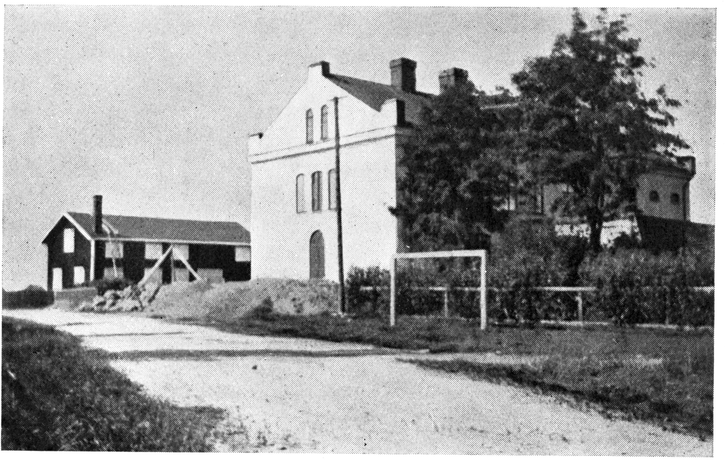 Kronohäktet i Haparanda